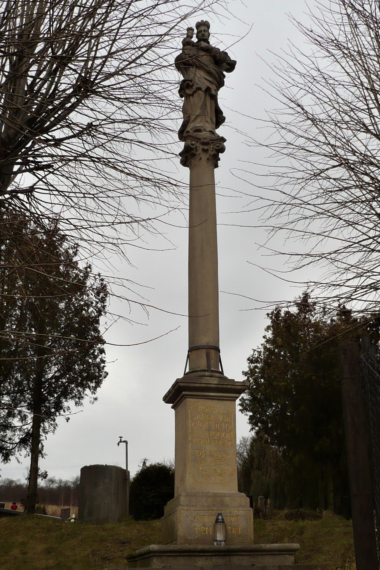 Kolumna Maryjna na cmentarzu w Nowej Rudzie